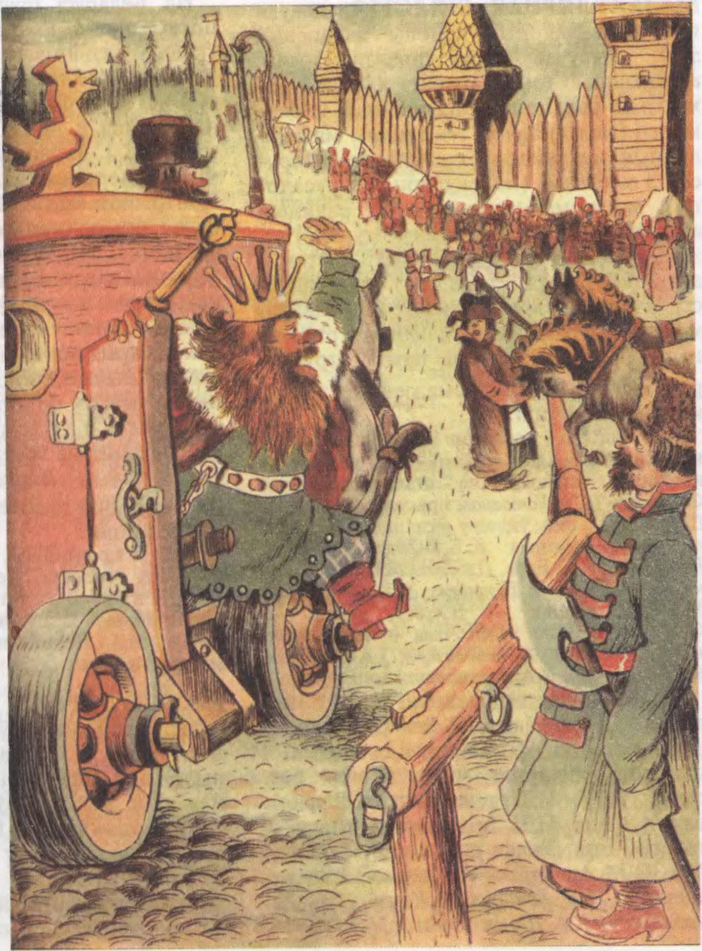 Мікалай Малевіч. Ілюстрацыя да казкі «Канёк-гарбунок» П.Яршова. 1938